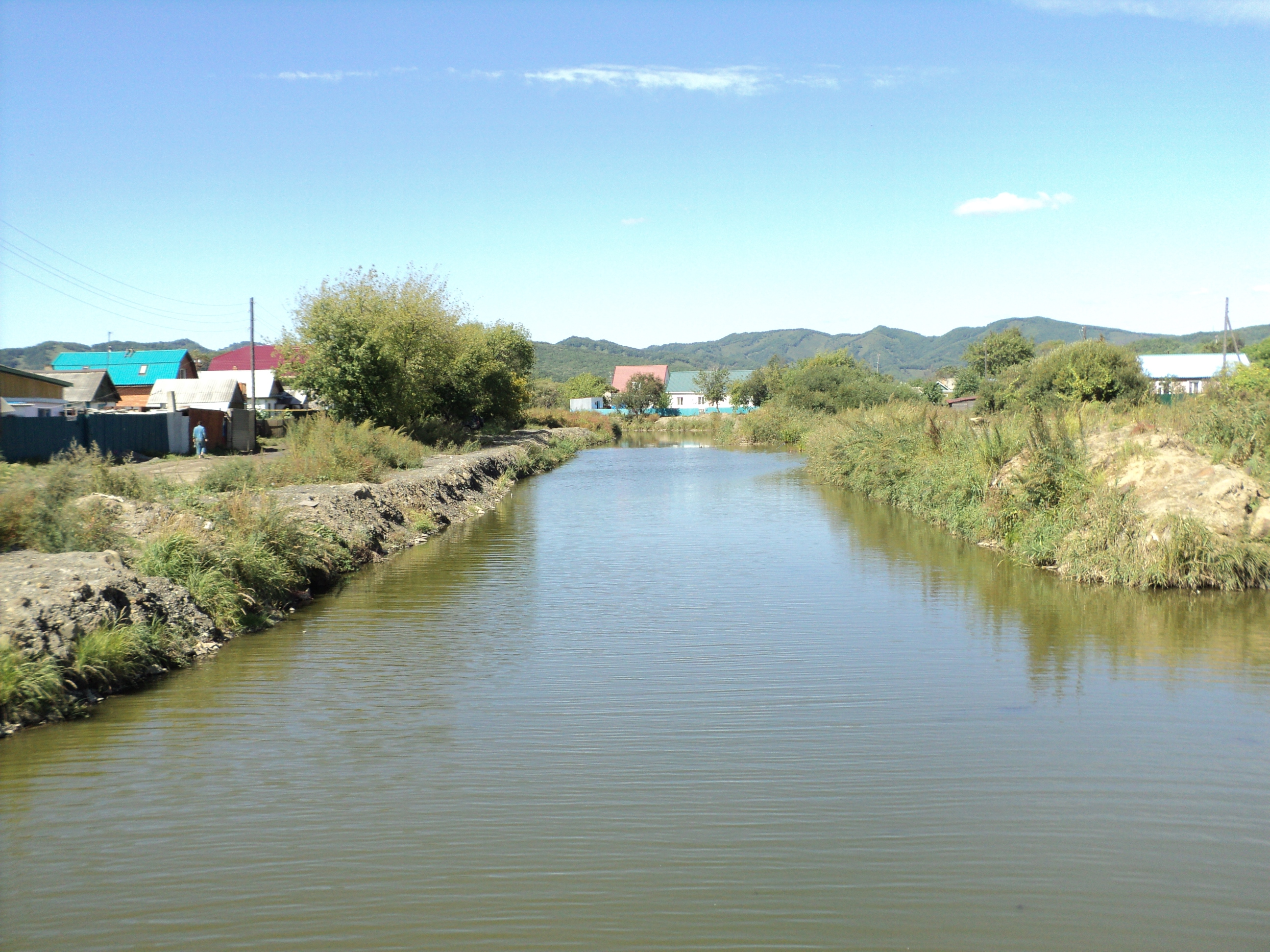 Верховье реки Каменки